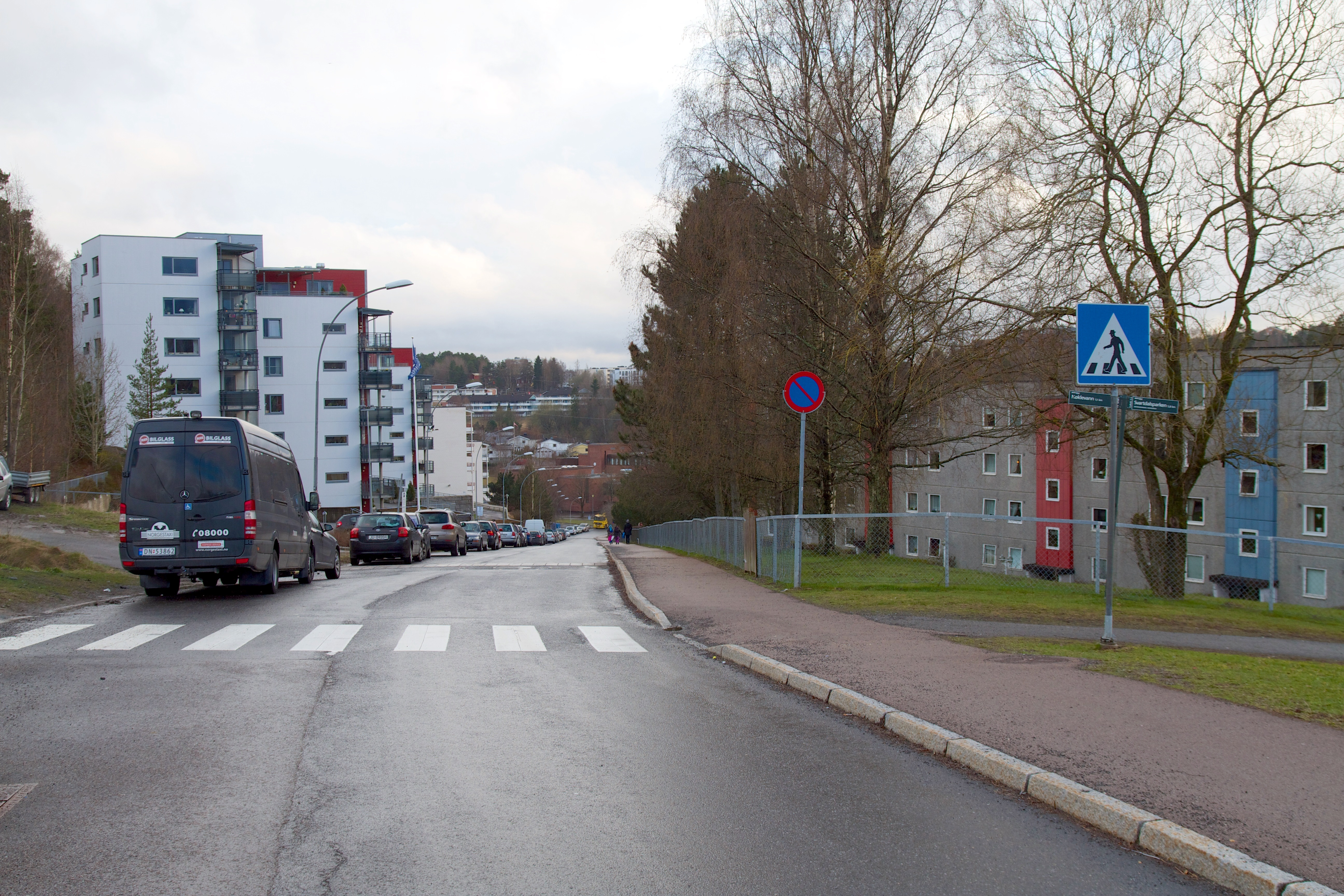 Paal Bergs vei på Rustad i Oslo.